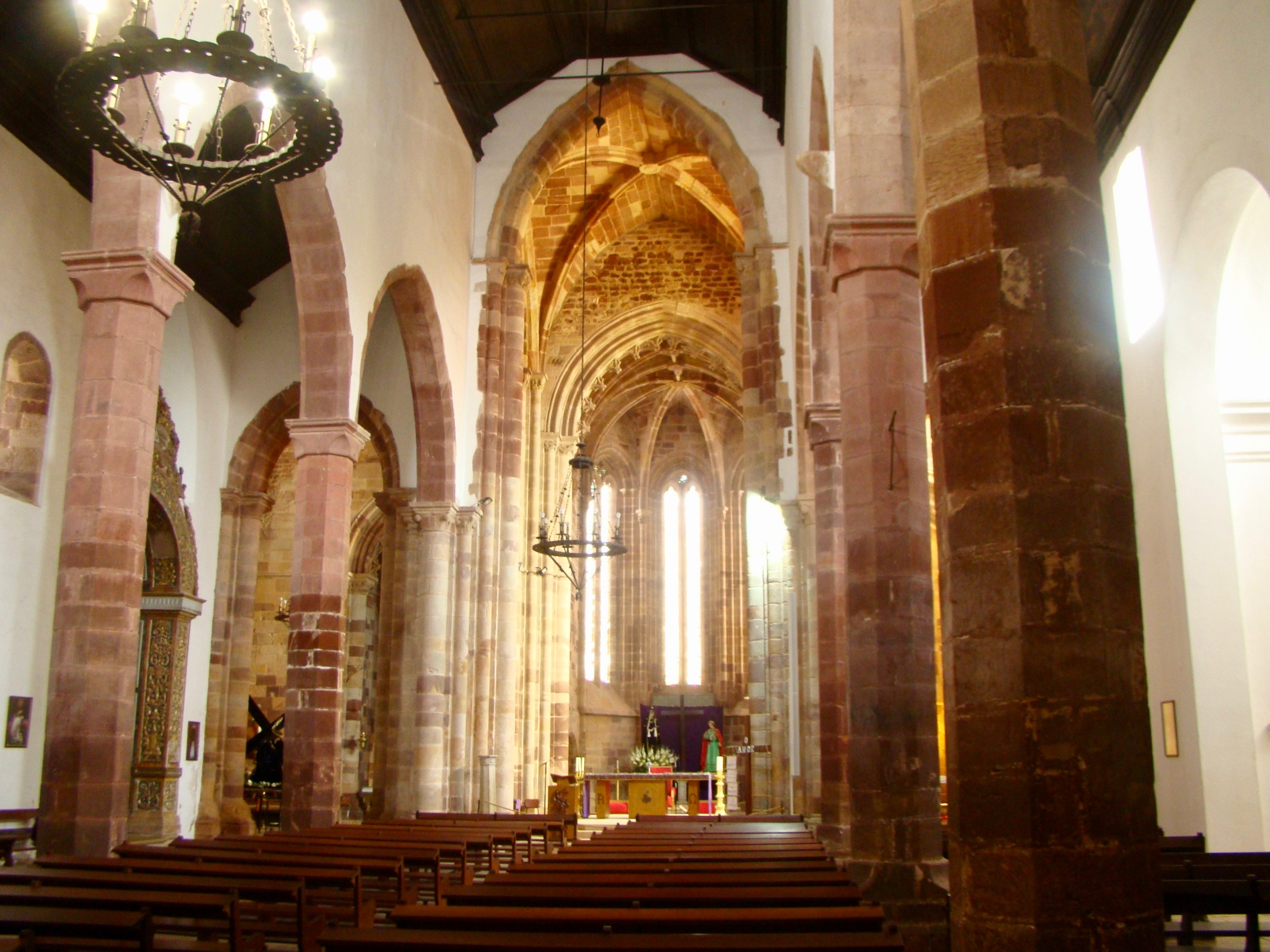 Sé Catedral de Silves - nave central 2. 03/2018.